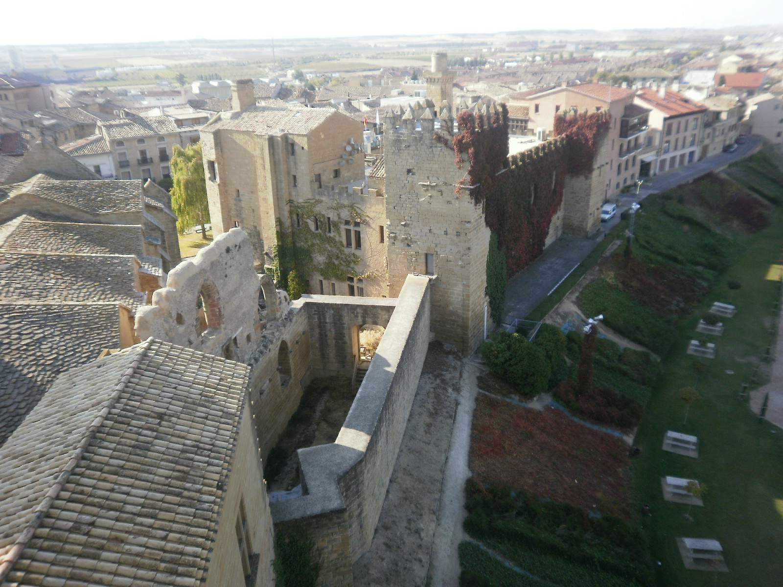 Castillo Viejo-Parador Nacional Principe de Viana (Olite, Navarra)